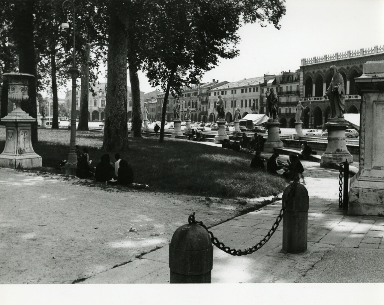 Servizio fotografico : Padova, 1967 / Paolo Monti. - Stampe: 2 : Positivo b/n, gelatina bromuro d'argento/ carta, 18x24, 24x30. - ((Al verso delle stampe iscrizioni didascaliche manoscritte a matita; timbro a inchiostro con copyright: "© - Credit to:/ Paolo Monti/ Via T. Tasso [...]/ Milano [...]". - Sul coperchio della scatola iscrizione didascalica manoscritta a pennarello nero: "Emilia/ Ferrara, Padova". - Occasione: Documentazione per la pubblicazione: Diego Valeri (a cura di), "Padova: i secoli, le ore", Bologna, Edizioni Alfa, 1967. - Fonte: Monografia di Valeri Diego (a cura di): Padova: i secoli, le ore, Bologna, Edizioni Alfa (1967). - Fonte: Agenda di Paolo Monti: Monti/ 3 aprile 1966 - 9 marzo 1971/ 12421-16823 (1966-1971), presso Archivio Paolo Monti